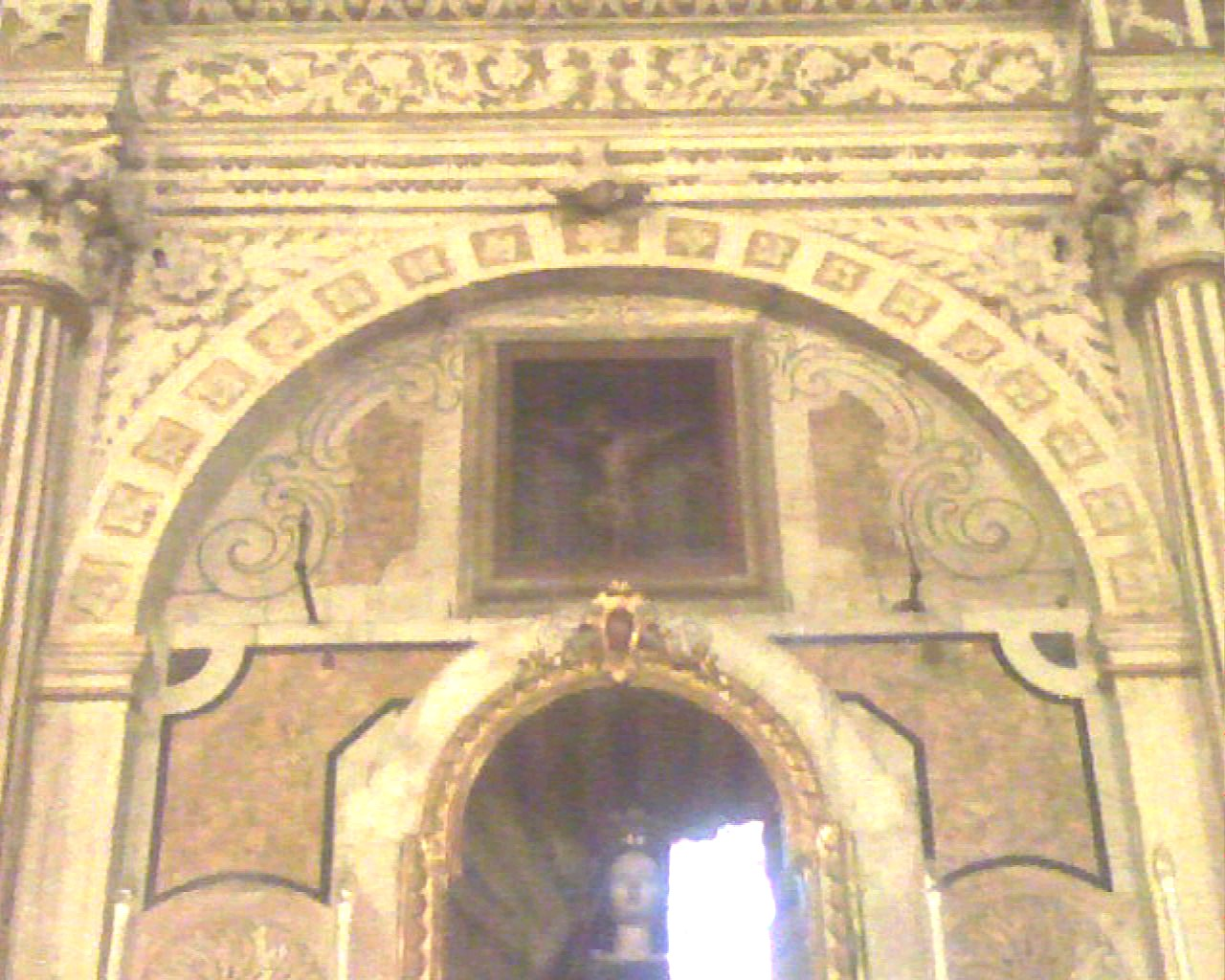 Chiesa Maria Santissima Annunziata - Modugno (Bari) - Italy